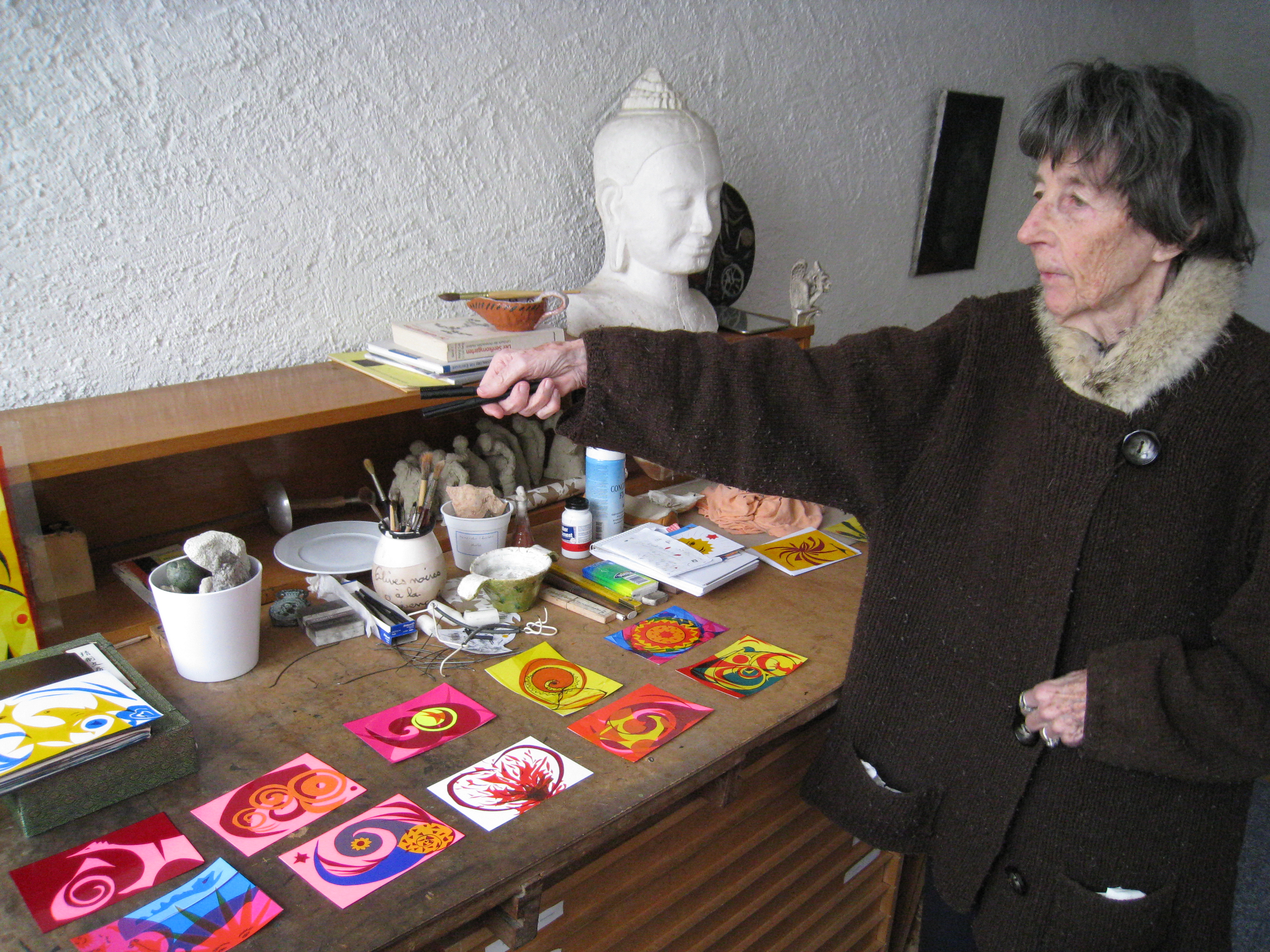 Ruth Steinegger in ihrem Atelier in Freienstein ZH am 13. Februar 2010